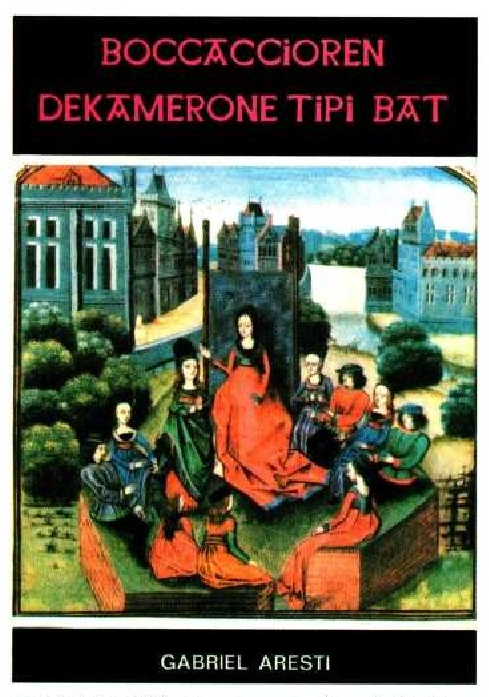 Boccaccioren «dl Decamerone»-ren euskarazko itzulpenaren azala, GabrielArestik egina. (L. Haranburu arg. Donostia, 1979)